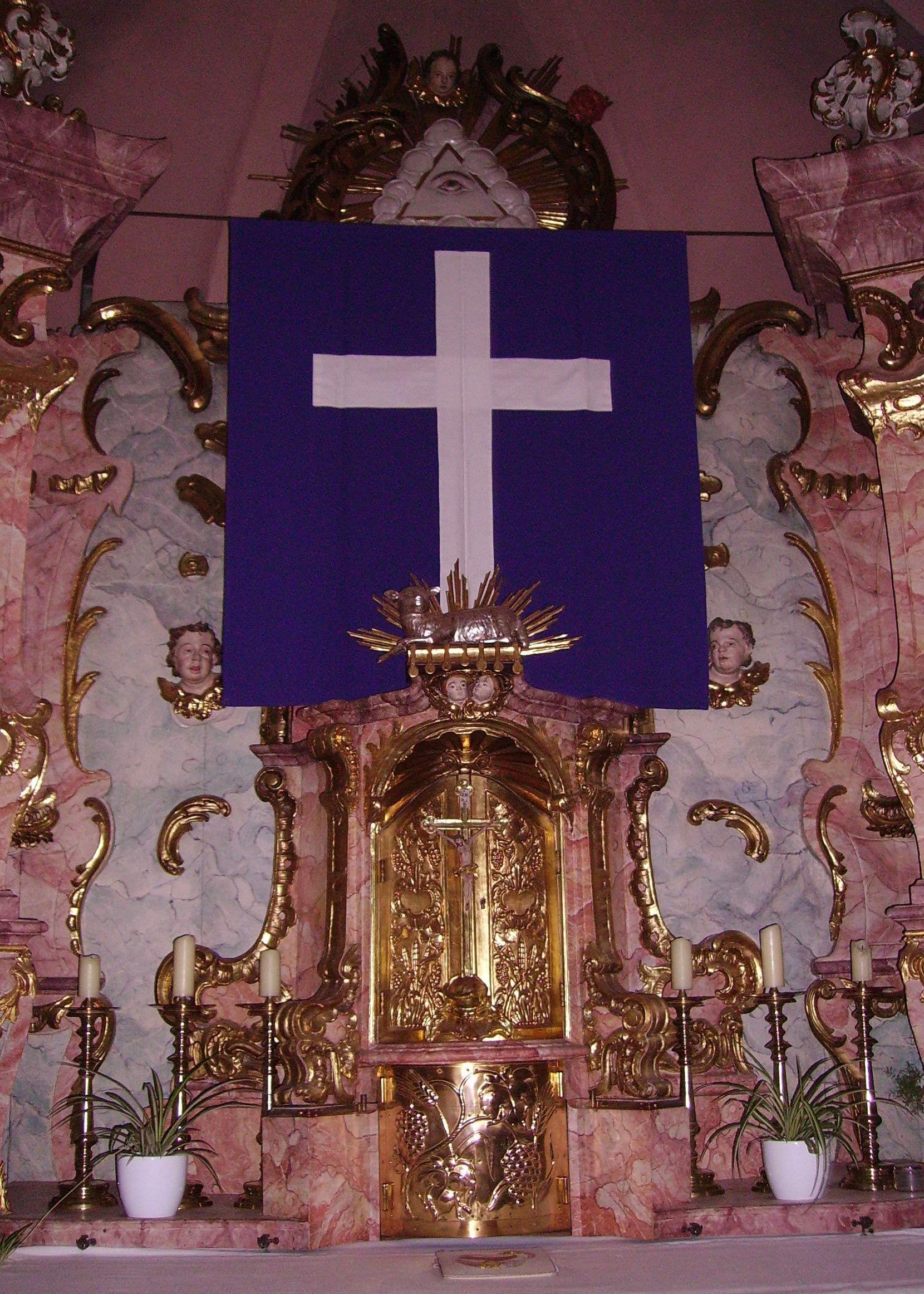 altar in Königsfeld in Oberfranken,Germany